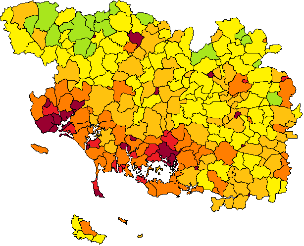 carte de densité de population des communes du Morbihan (d'après chiffres INSEE de 2007)